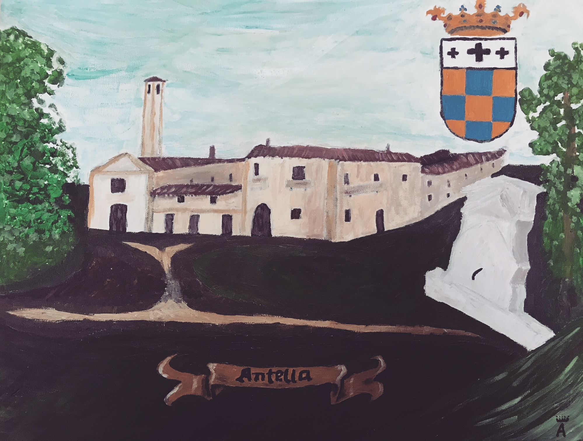 Antella Bagno a Ripoli, Marquesado de Antella, titulo otorgado a Nicolas Pallavicino en 1649 por Enrique IV de España.